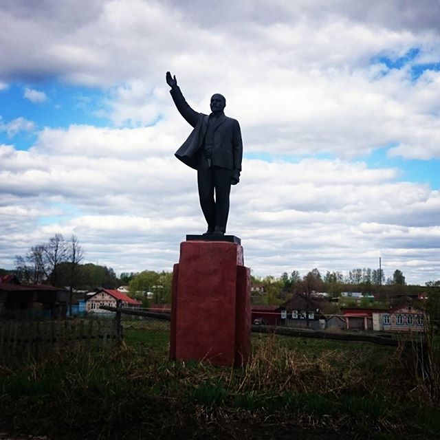 Ленин в селе Хормалы